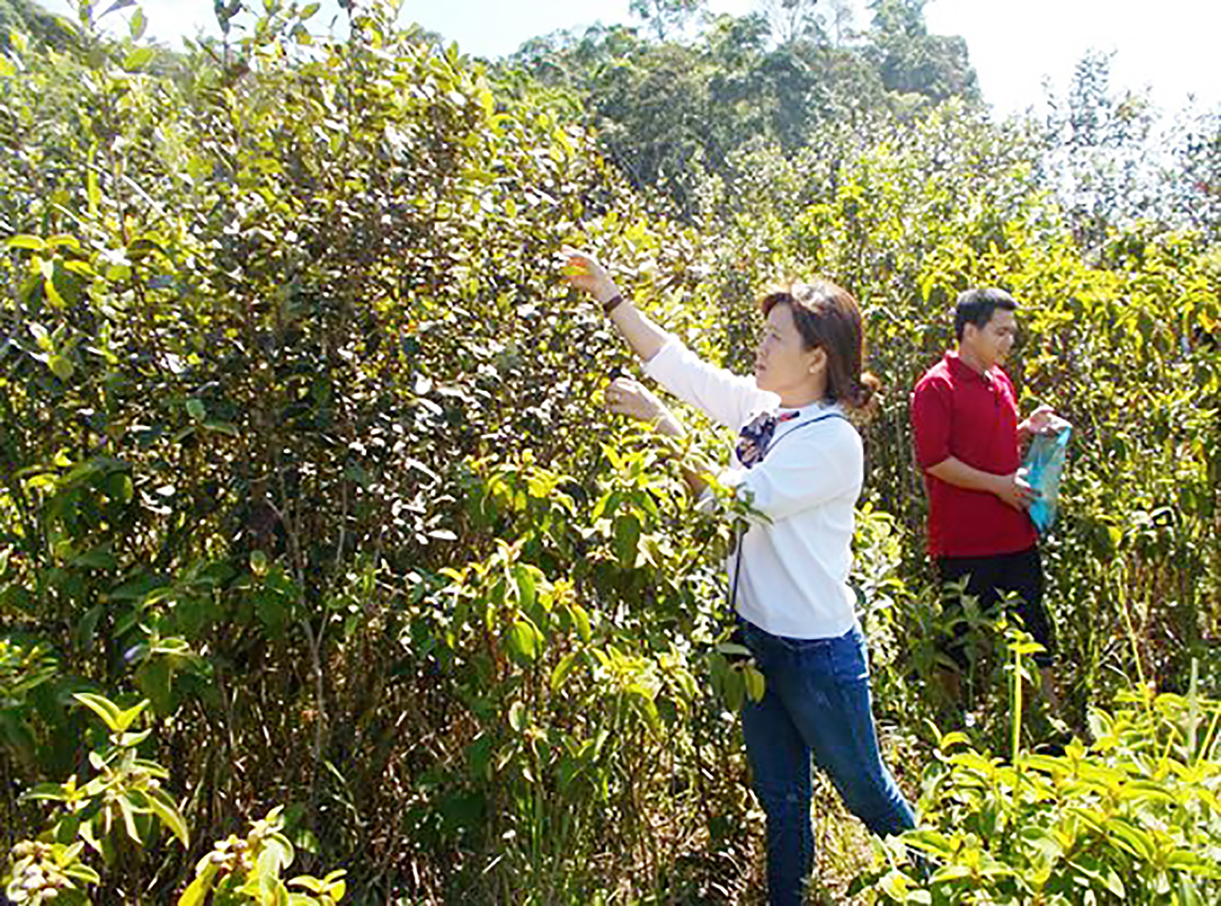 Ảnh sim sưu tầm